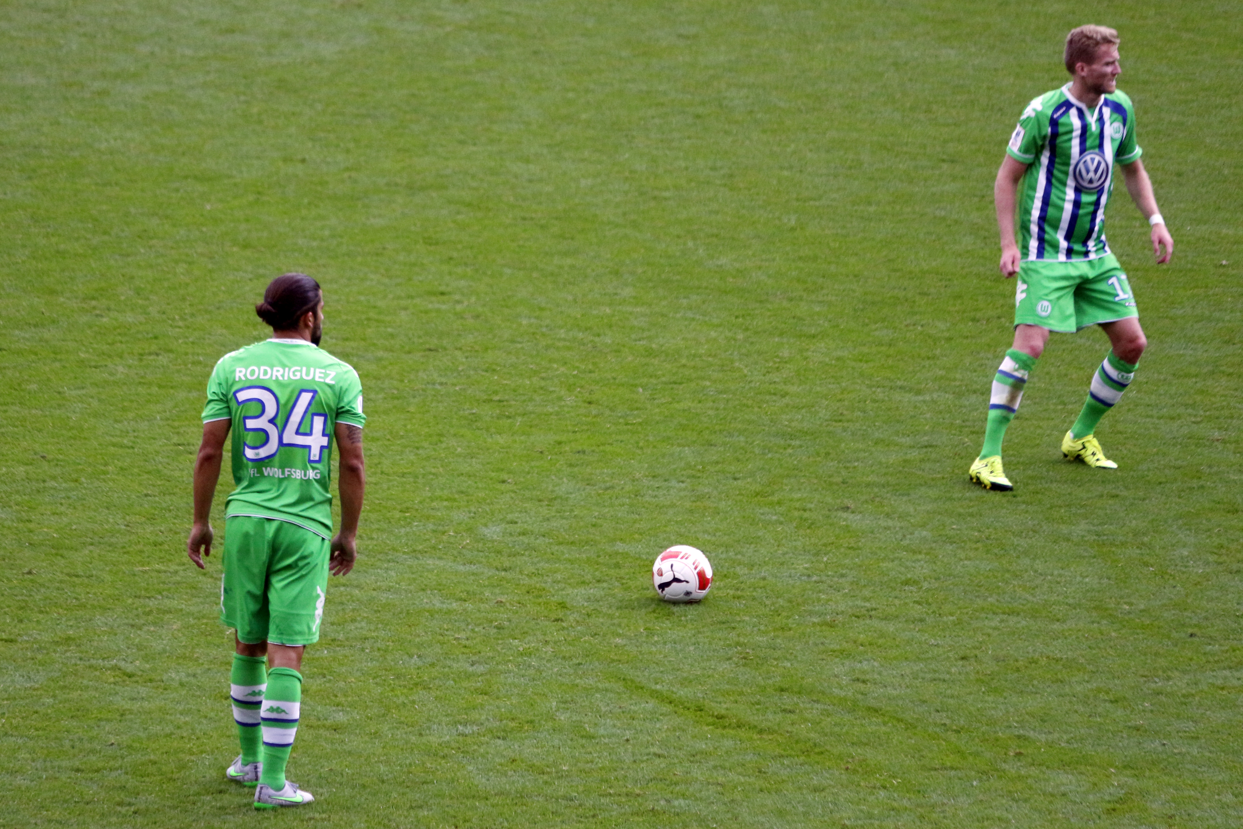 Emirates Cup 2015, Emirates Stadium